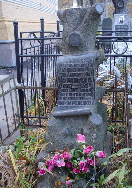 Надгробие Муравьевой Е. А. на Байковом кладбище, Киев